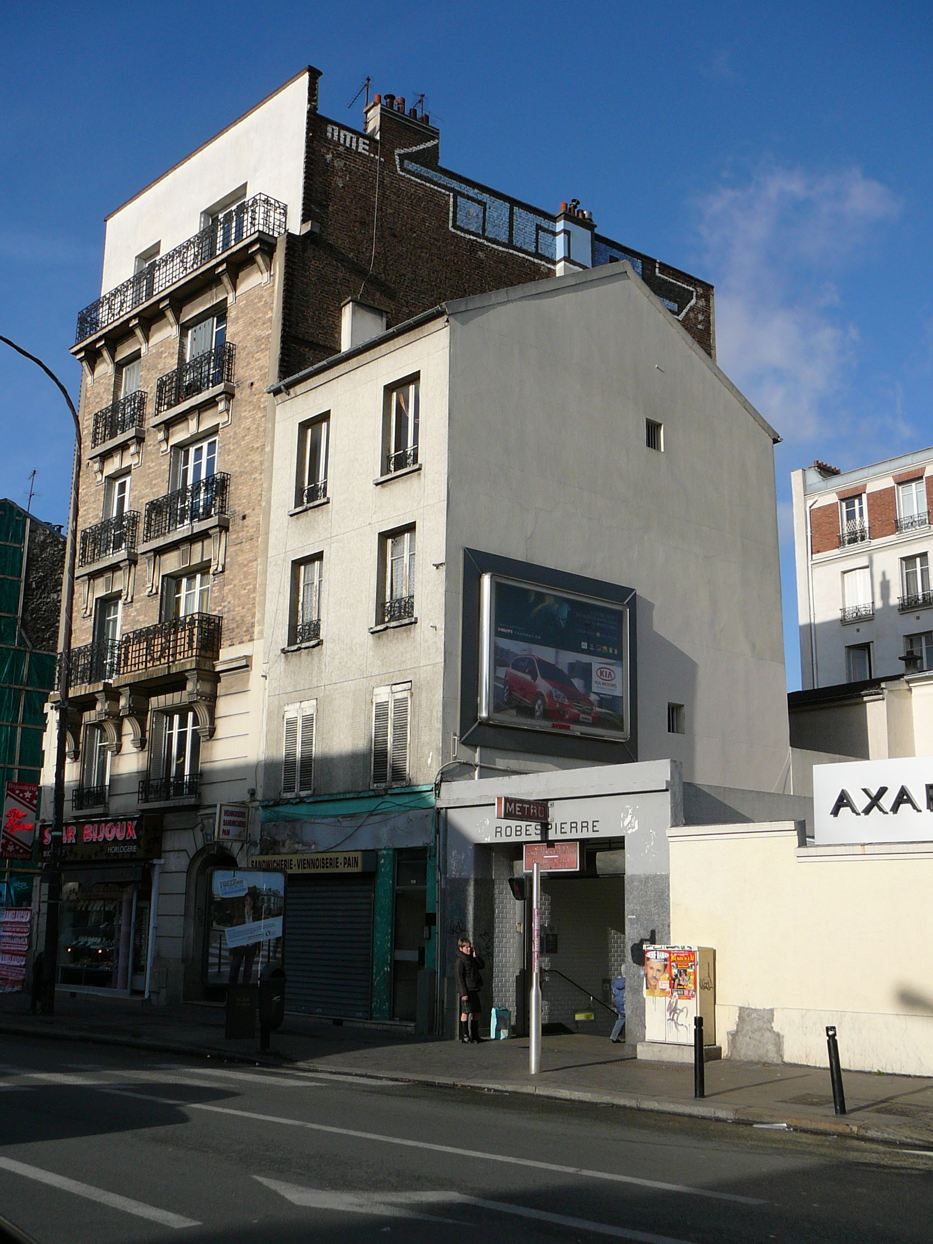 Station de métro Robespierre, Montreuil, France